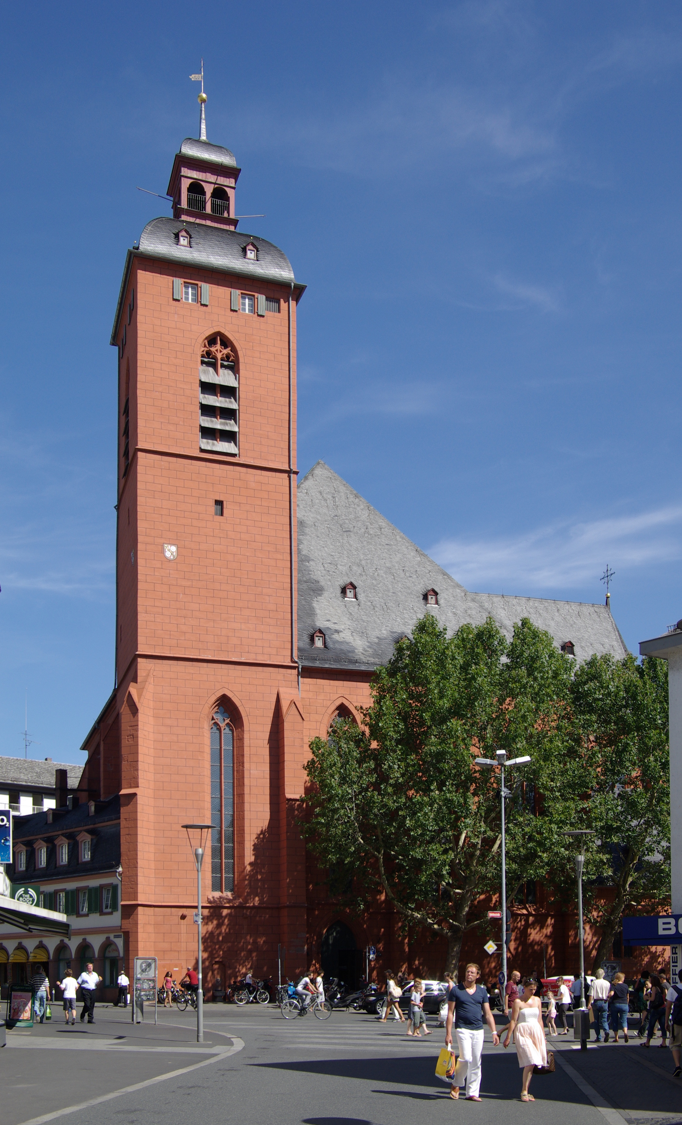 Mainz, St. Quintin